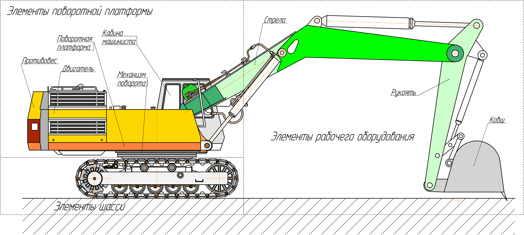 Схема полноповоротного одноковшового экскаватора